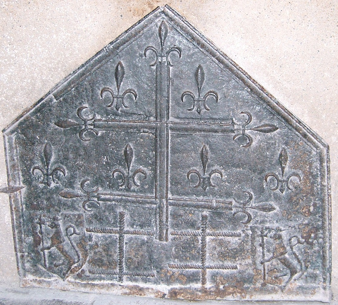 plaque de cheminée (appelée aussi "taque") dans la maison natale de Jeanne d'Arc à Domrémy avec lys de France.